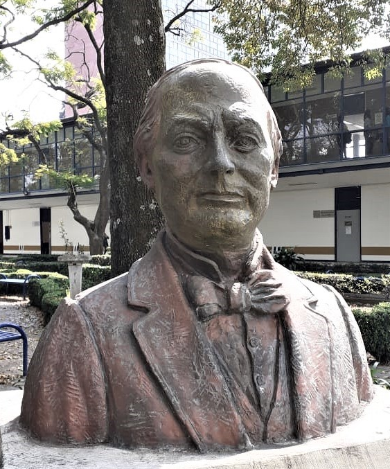 Busto de Sebastían Lerdo de Tejada ubicado en los jardines de la Facultad de Derecho de la Universidad Nacional Autónoma de México.